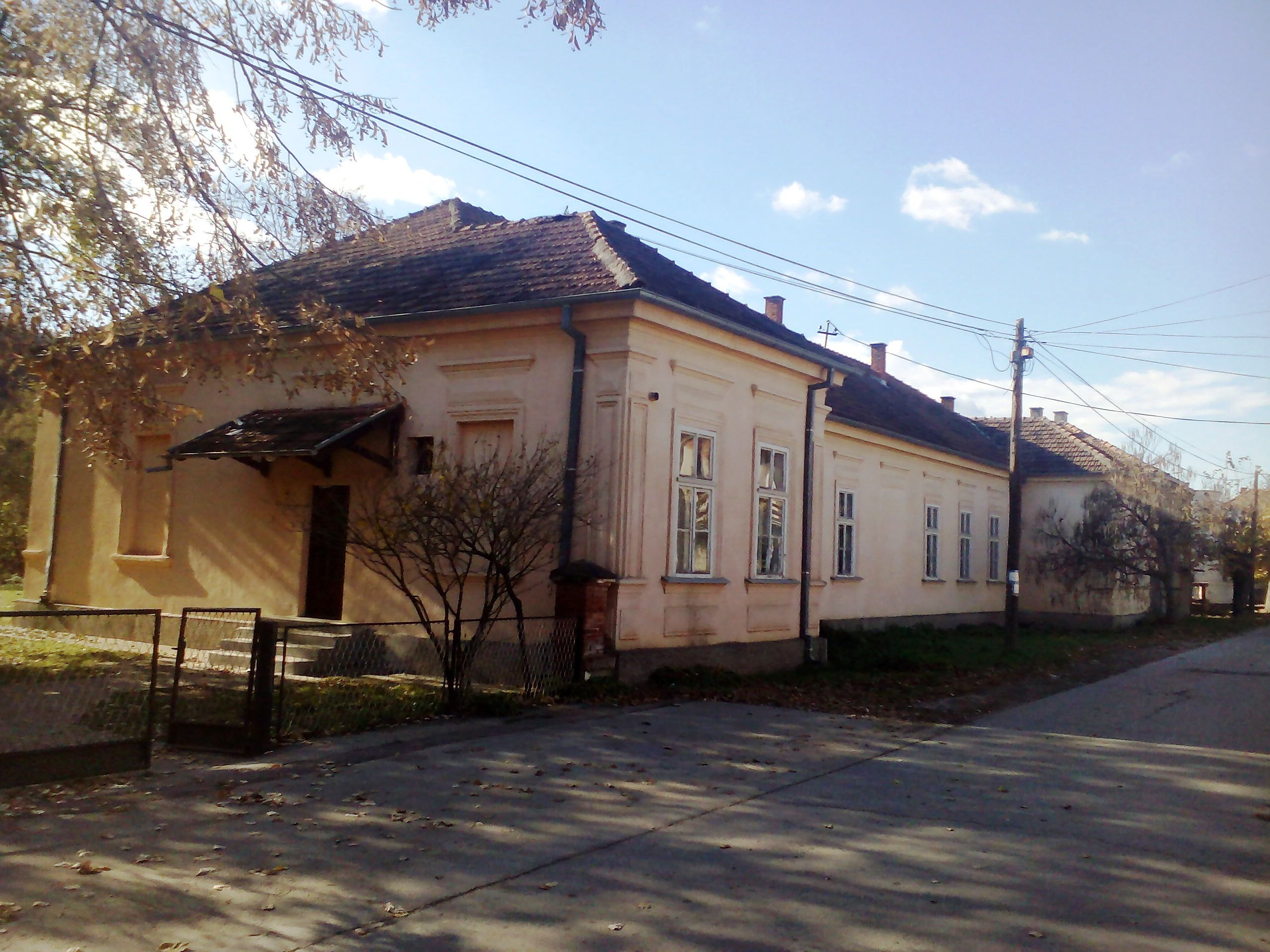 Стара школска зграда